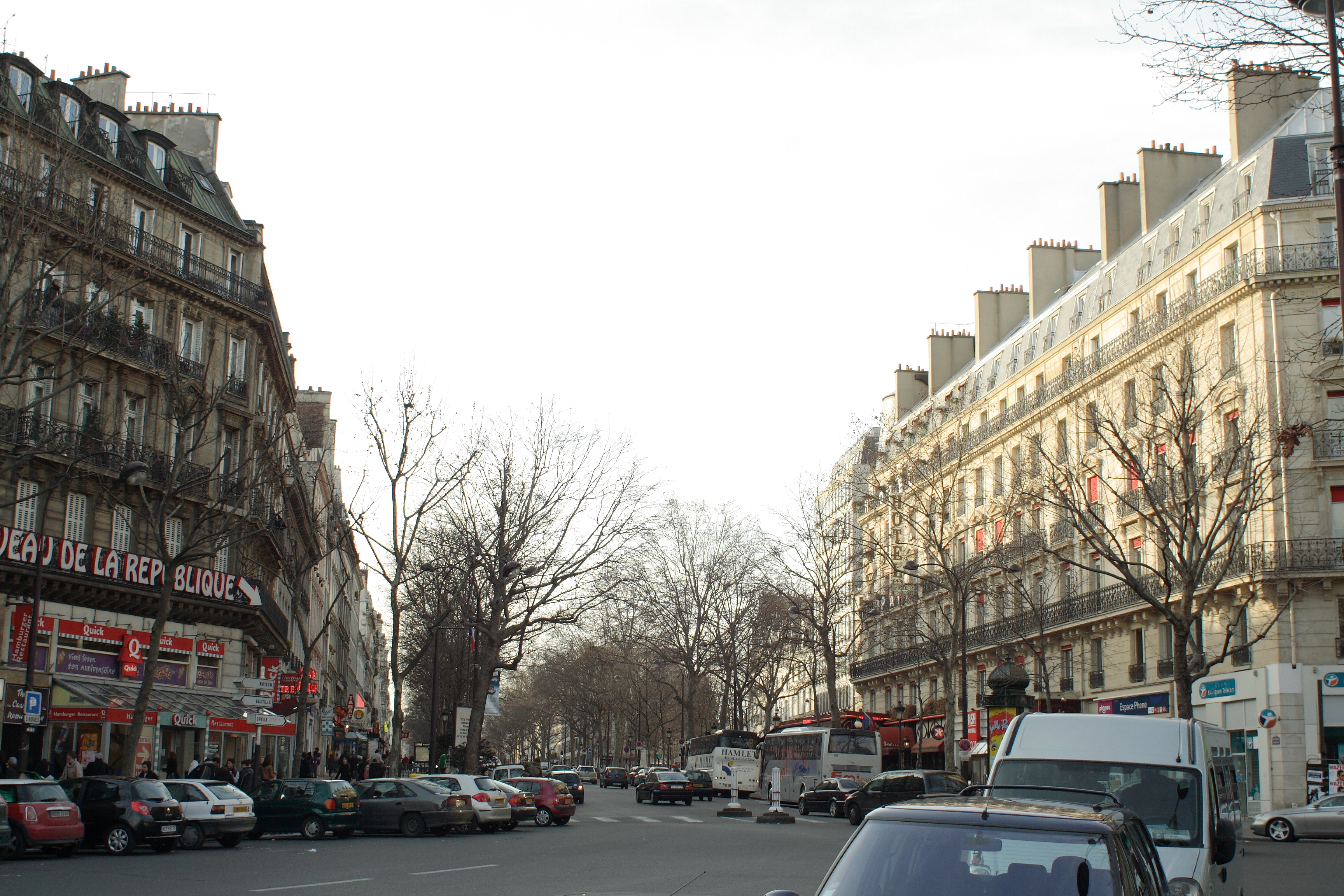 Débouché du boulevard Saint-Martin sur la place de la République (Paris).